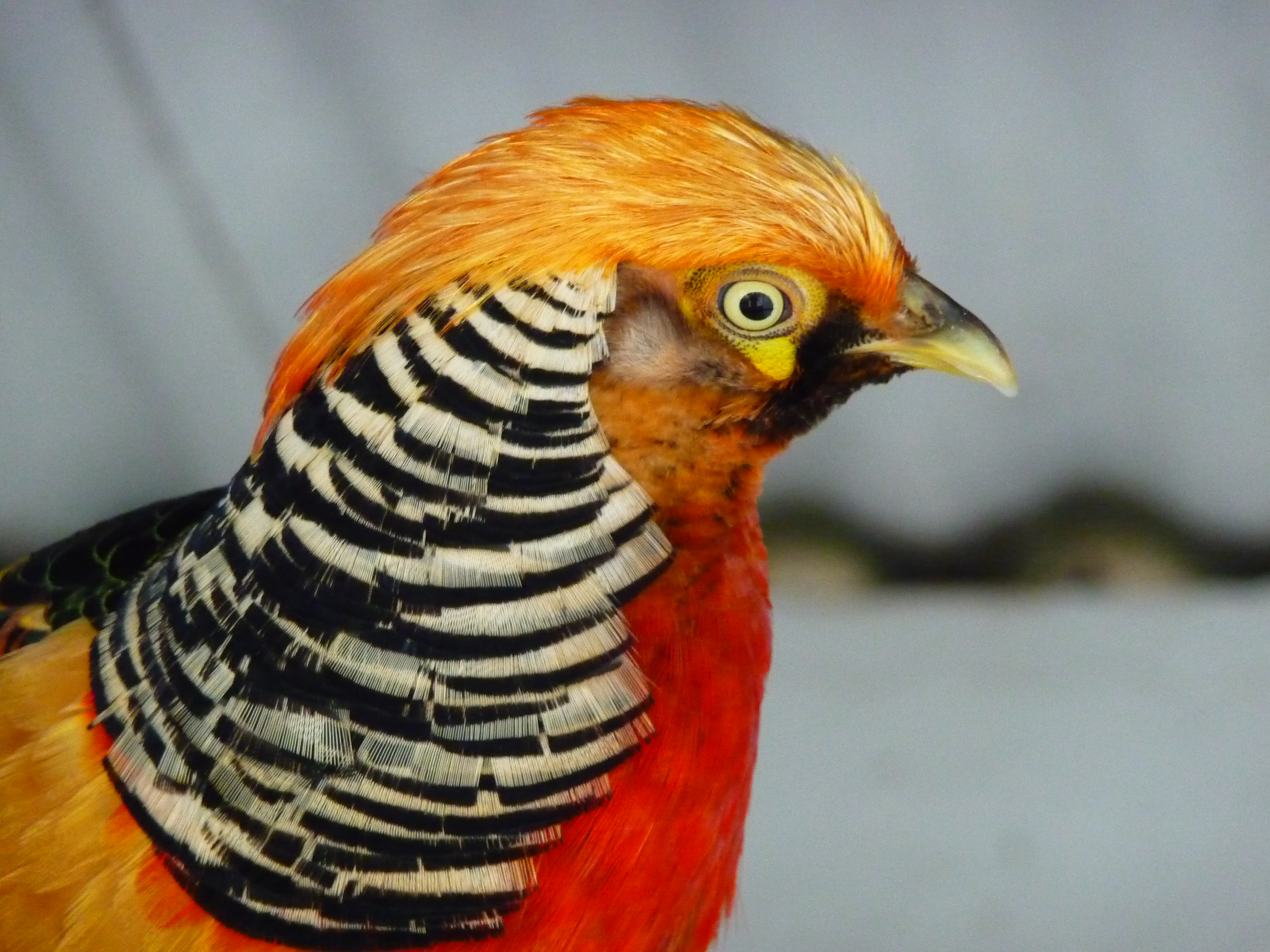 Nahaufnahme eines Amgoldfasans (Kreuzung aus Goldfasan mit Diamantfasan)